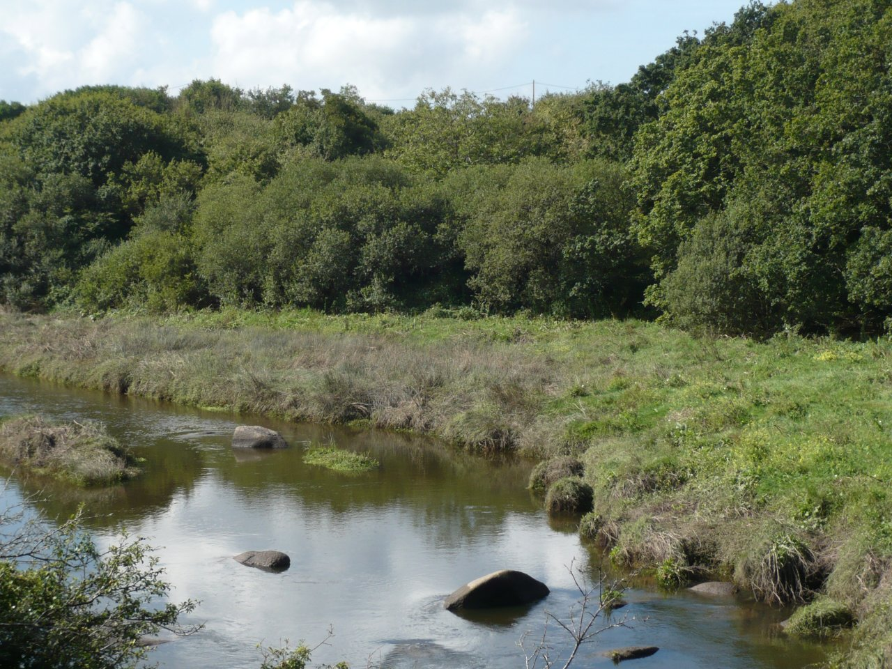 L'Idut